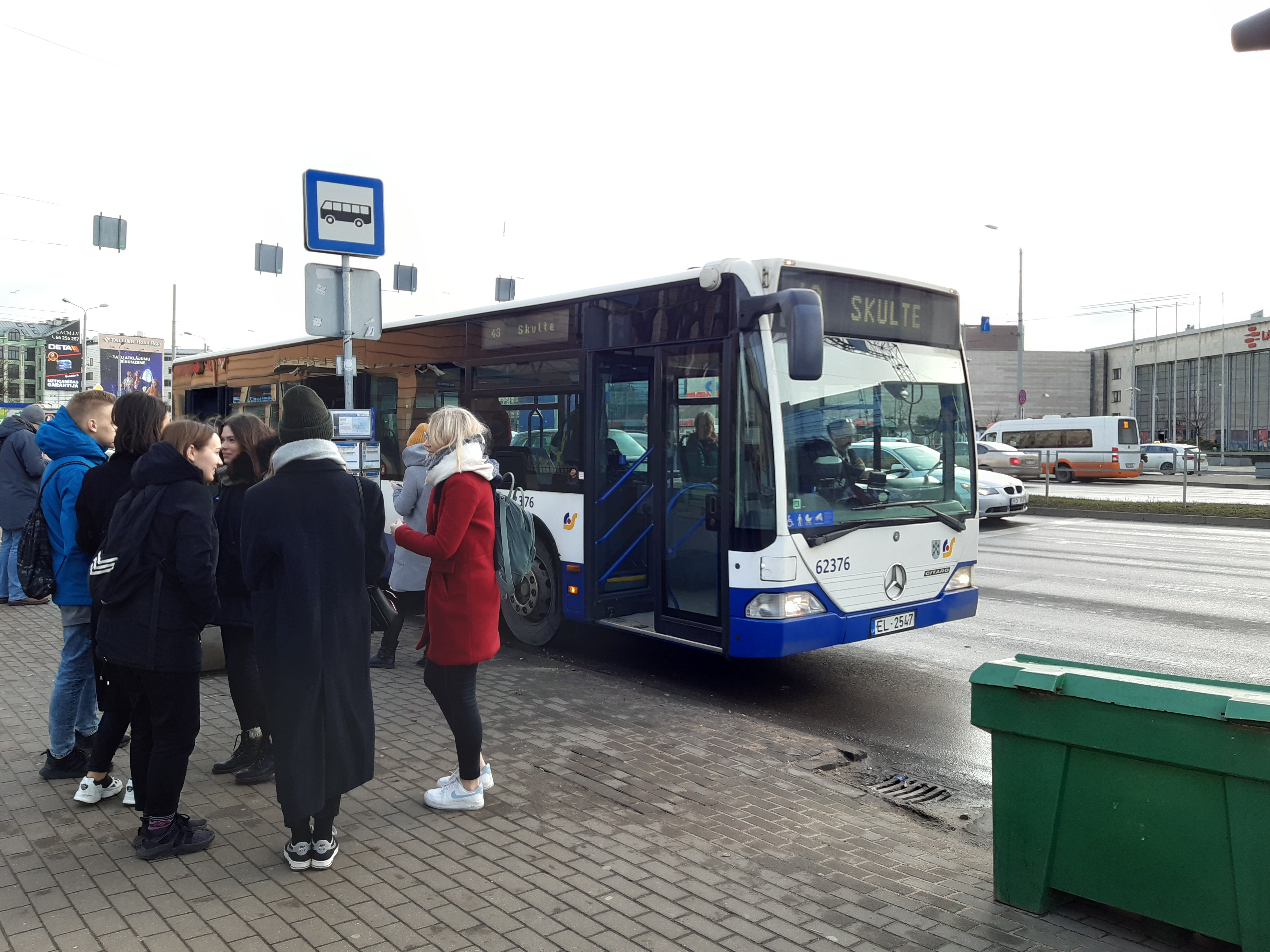 43. maršruta autobuss pie Centrālās dzelzceļa stacijas.